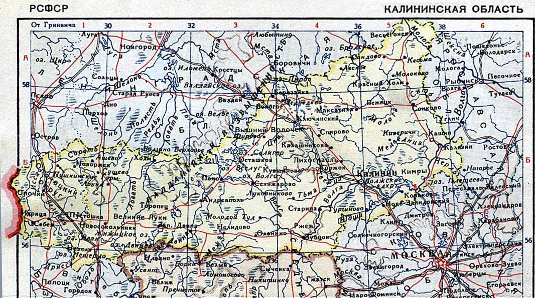 Калининская область,Карманный атлас СССР 1939